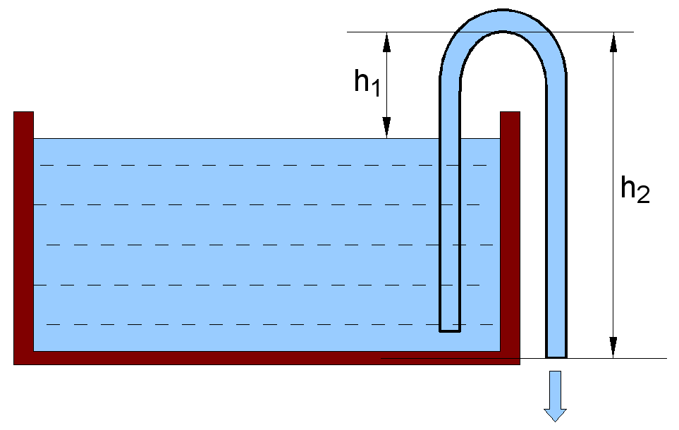 Principio del sifón